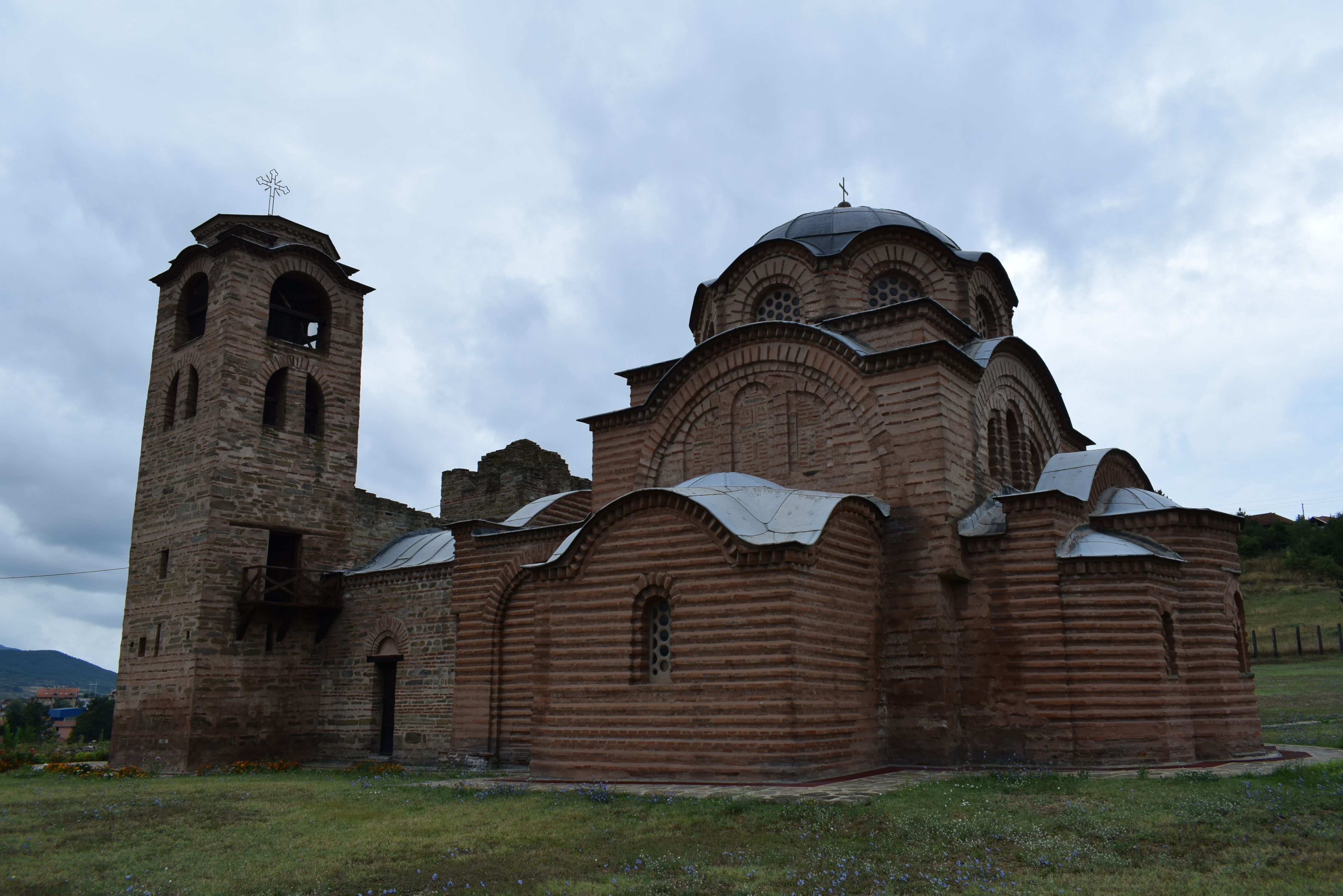 Manastir Svetog Nikole kod Kuršumlije, spolja 09